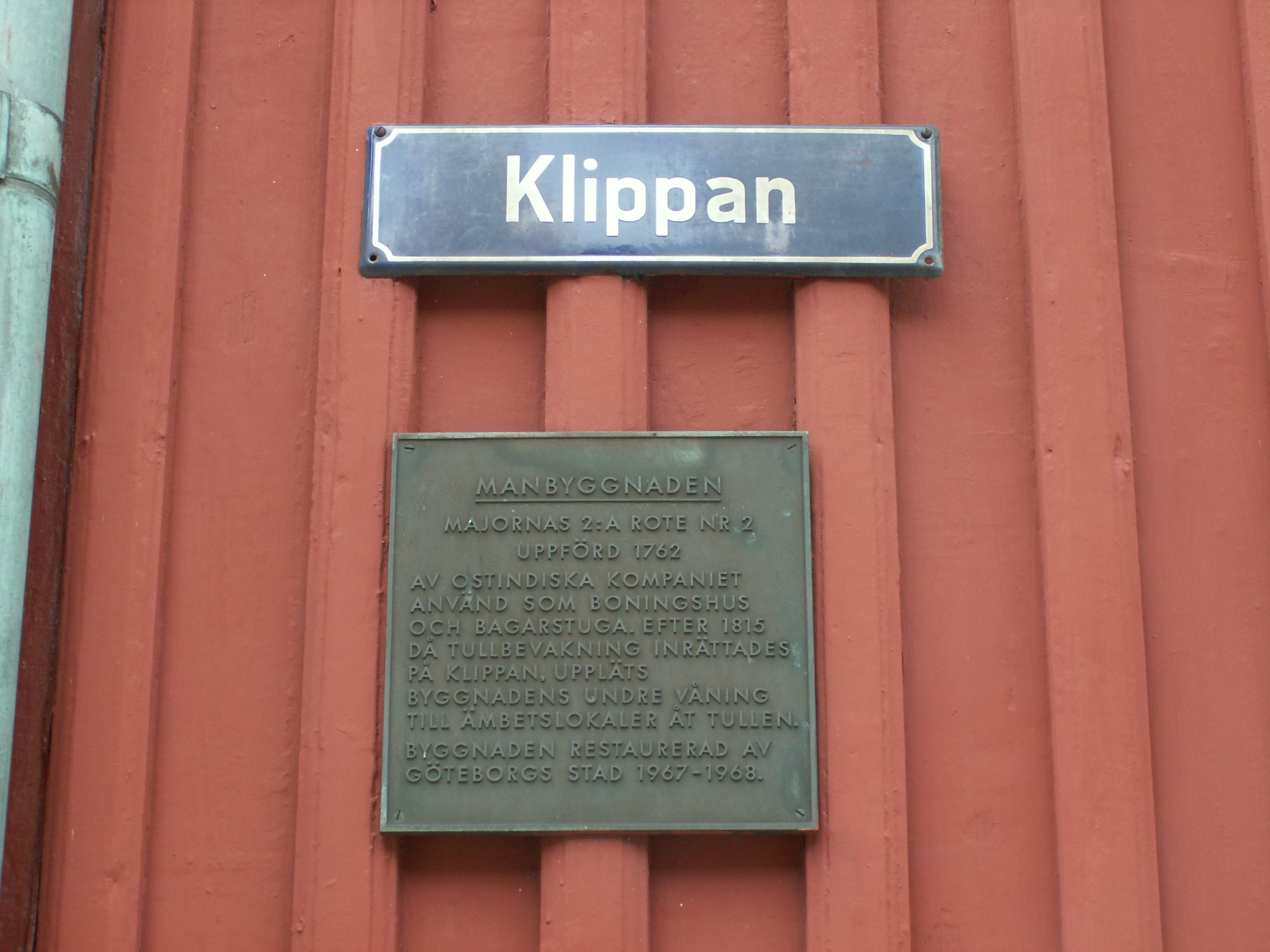 Klippans kulturreservat i stadsdelen Majorna i Göteborg. Infoskylt på Klippan 4, uppfört 1762. Även benämnt "Palmens hus" efter sjökapten Palm.